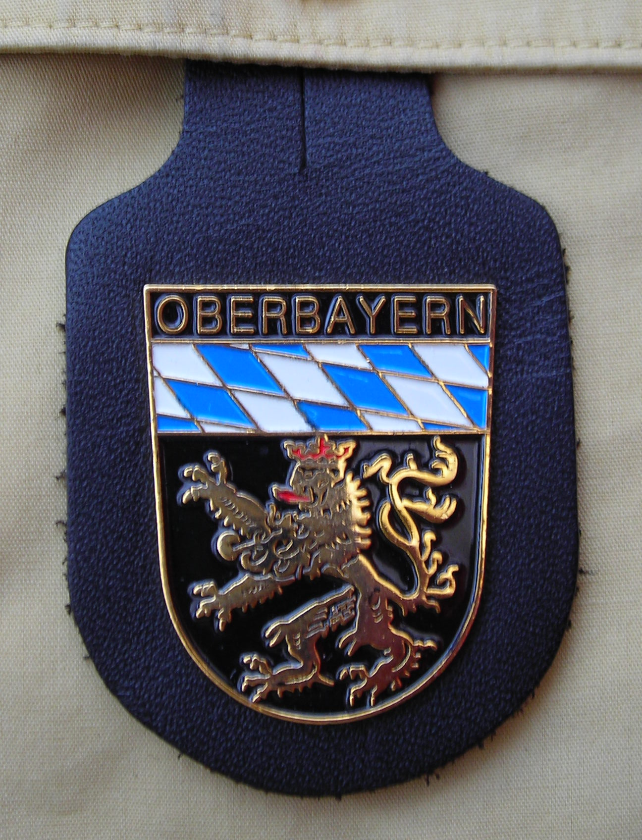 Verbandsabzeichen des Polizeipräsidiums Oberbayern als Brusttaschenanhänger (aufgelöster Verband).